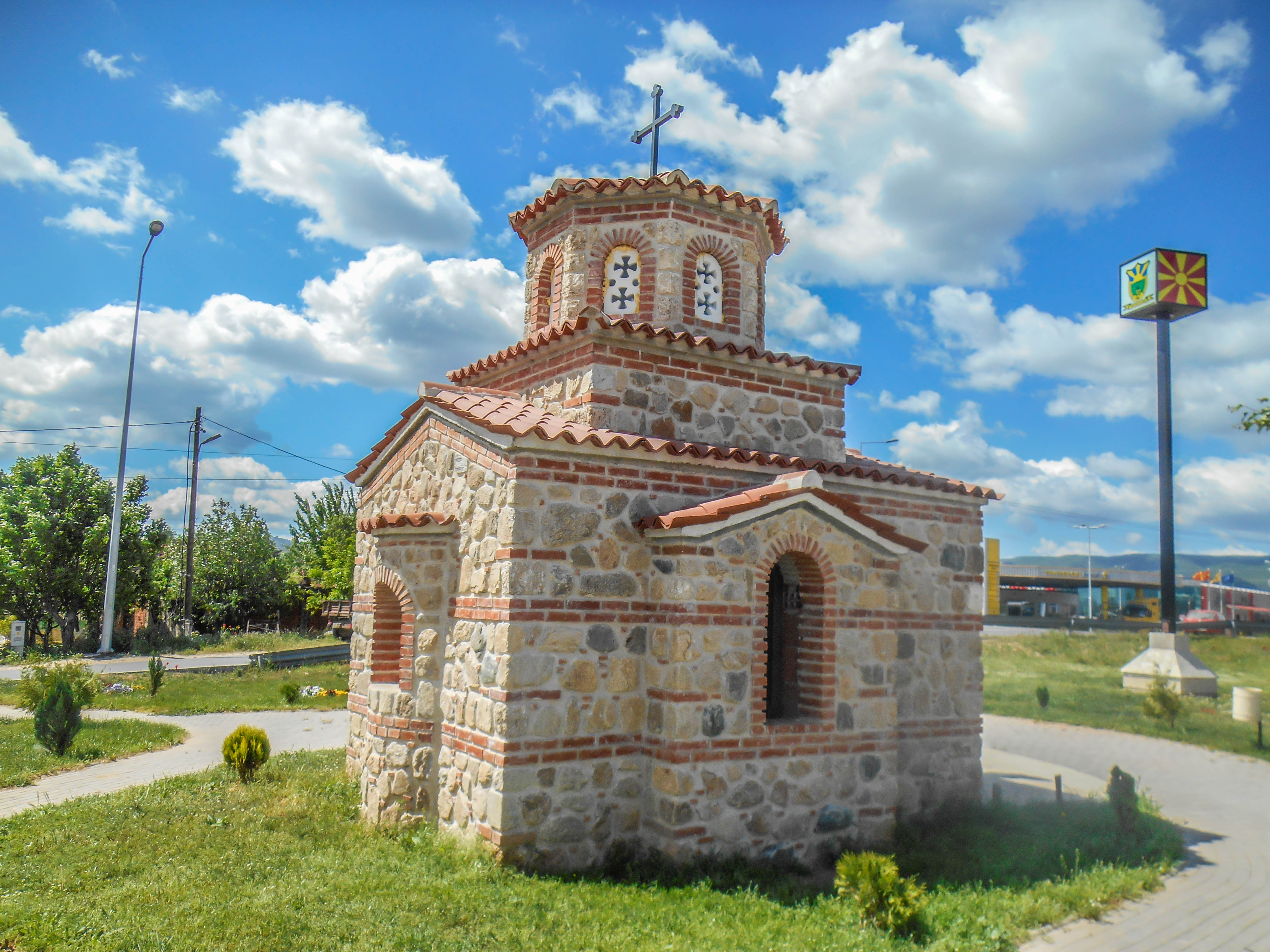 Црква „Св. Петка“ - Василево